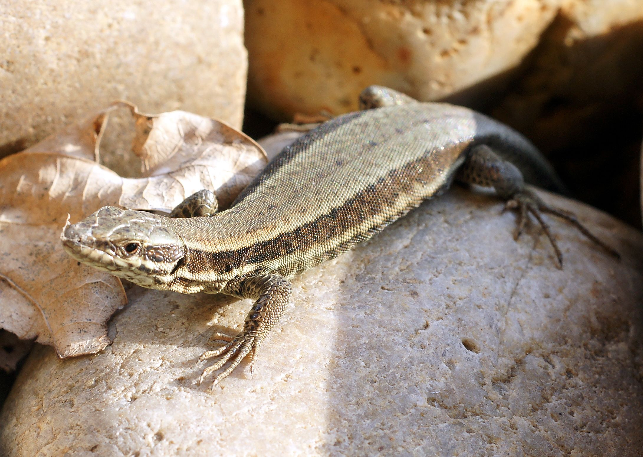 Podarcis muralis female